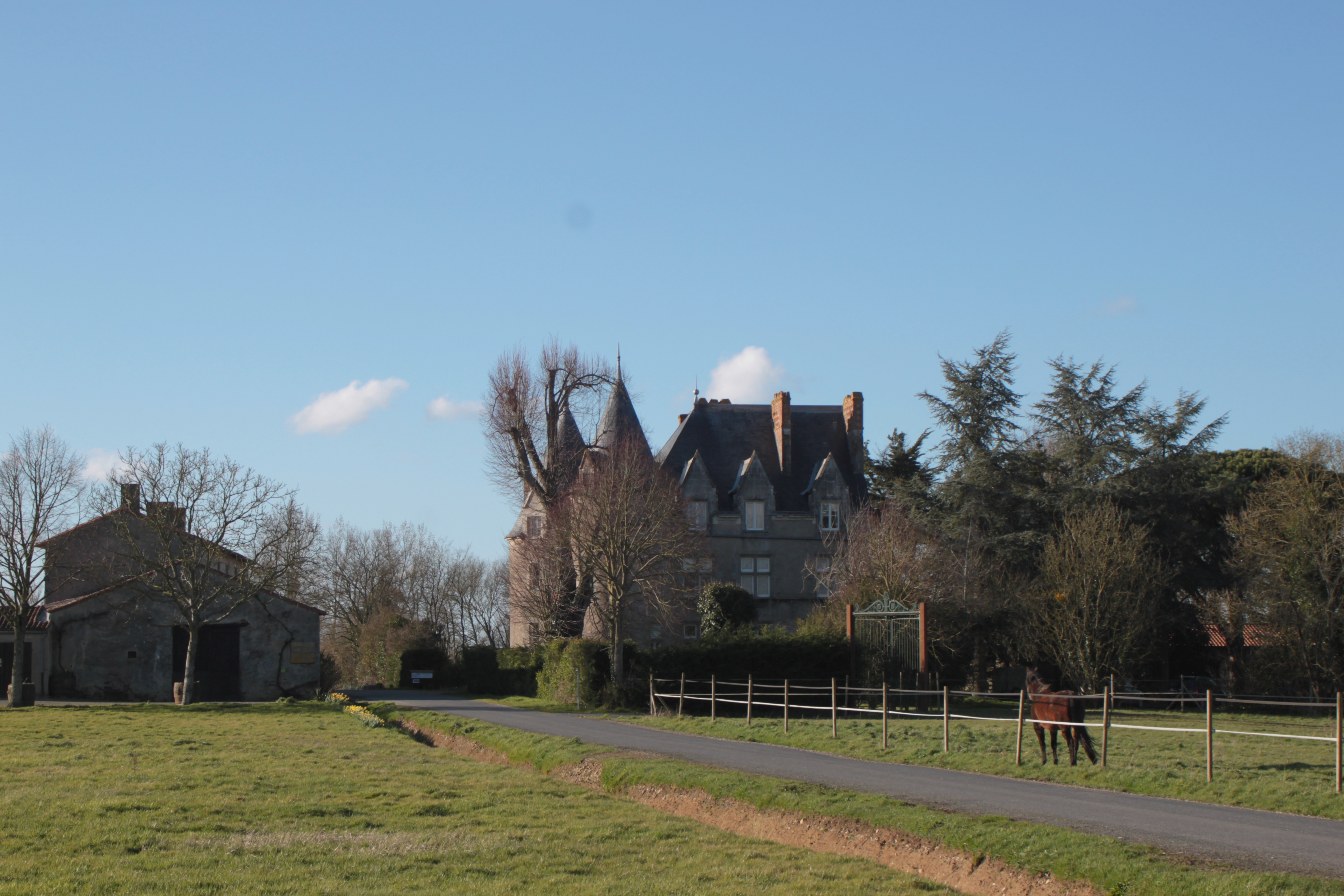 Château de la Preuille. Fr-85-Saint-Hilaire-de-Loulay.